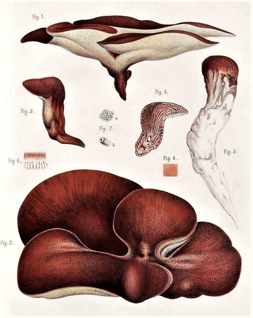 Jules de Seynes: Recherches pour servir à l'histoire naturelle des végétaux inférieurs – Des Fistulines, vol. 1, Ed. G. Masson, Paris 1874, planche I